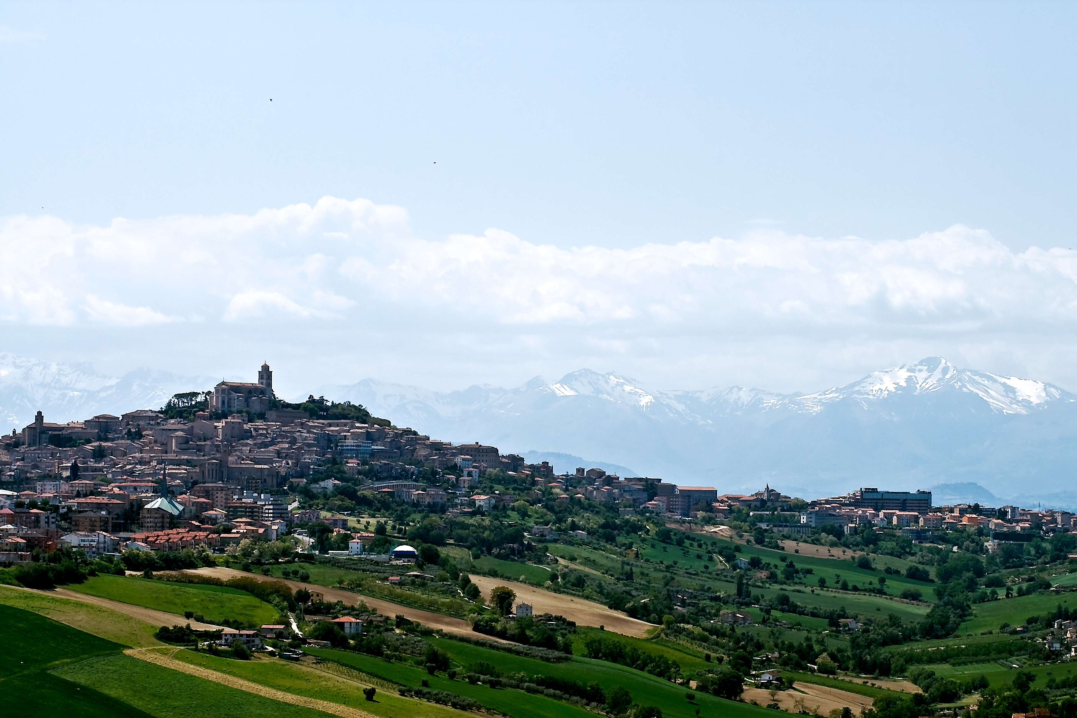 Fermo, Panorama con i Monti Sibillini